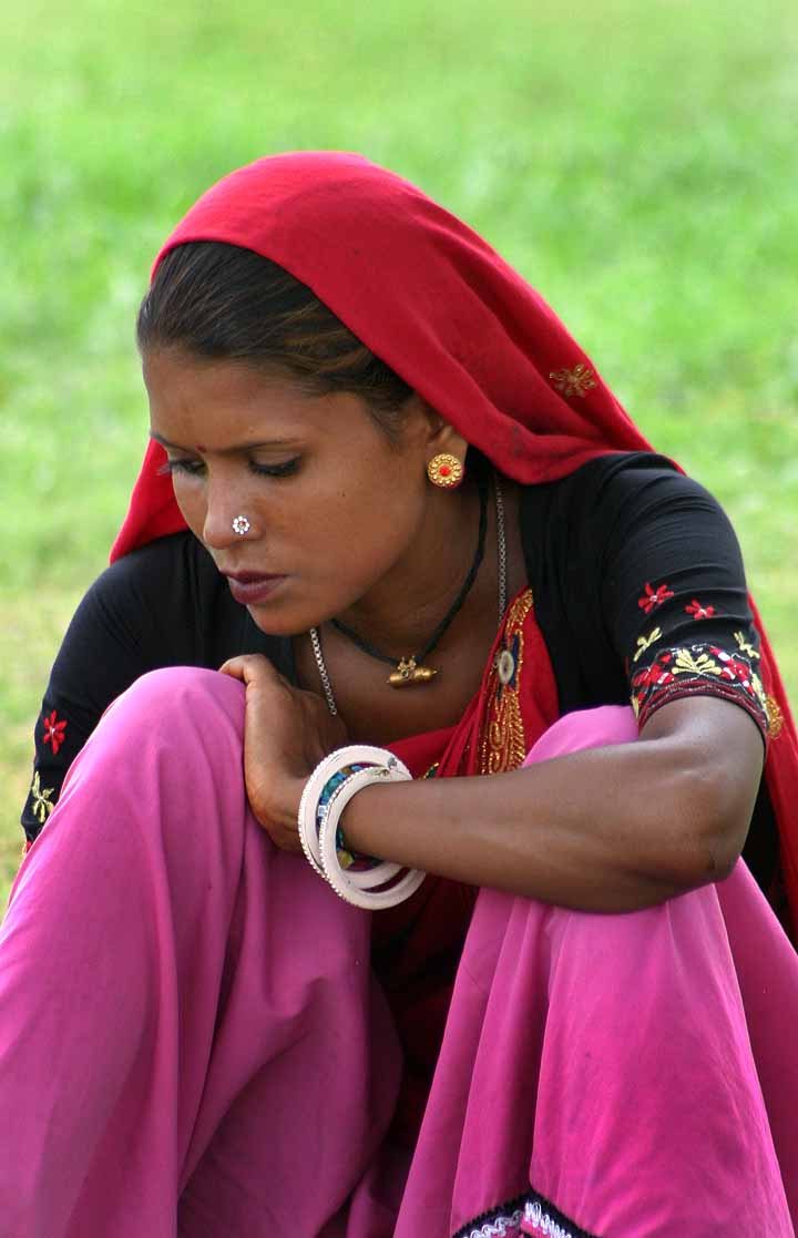 Delhi